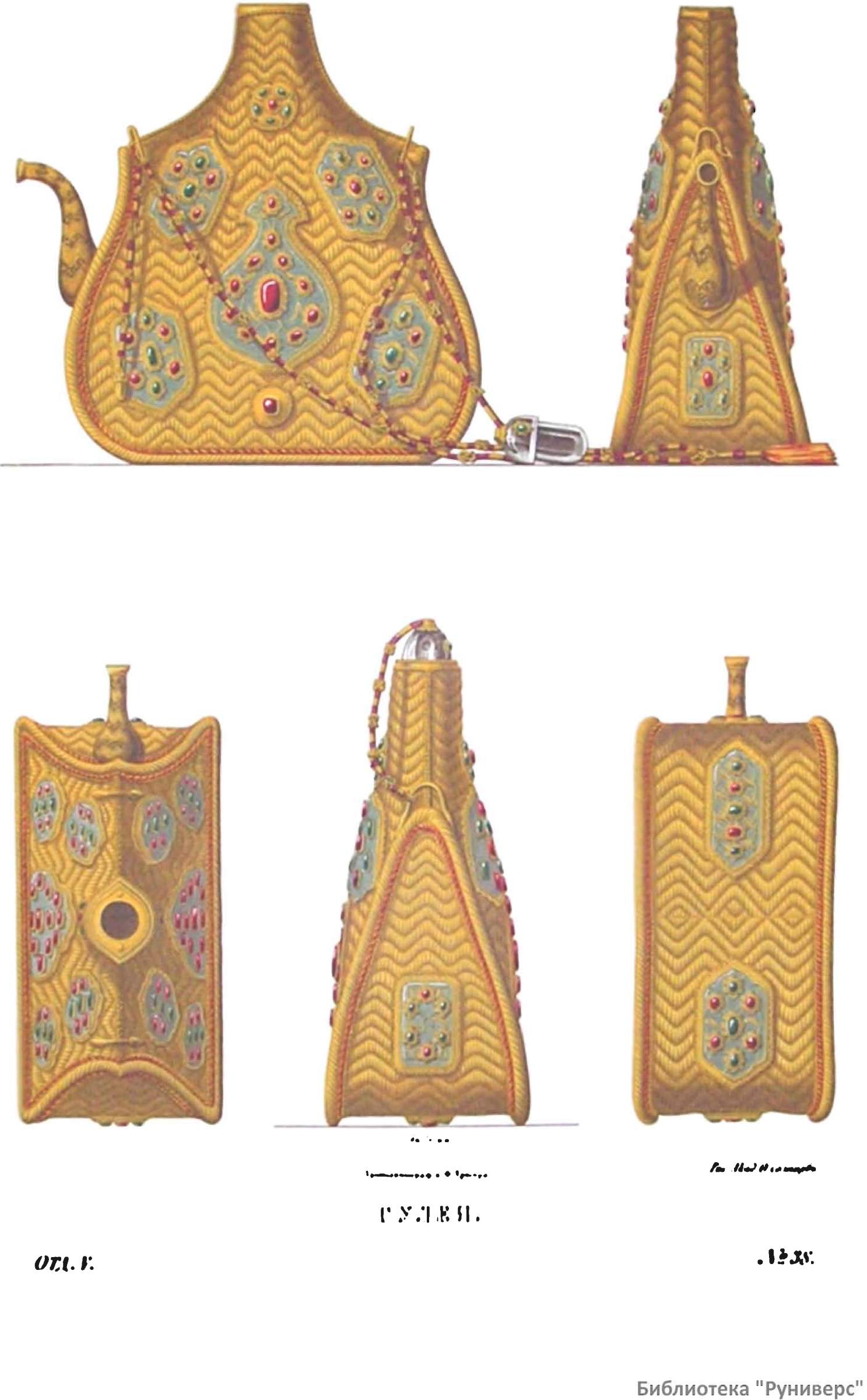 Древности Российского государства (Antiquities of Russian country), 1846—1853. Иллюстратор — Солнцев, Фёдор Григорьевич. "Сулея Турская". Рисунок Отд. V. № 38 Прислана в 1653 году царю Алексею Михайловичу в дар от касимовского царевича Сеид Бурхан Араслановича